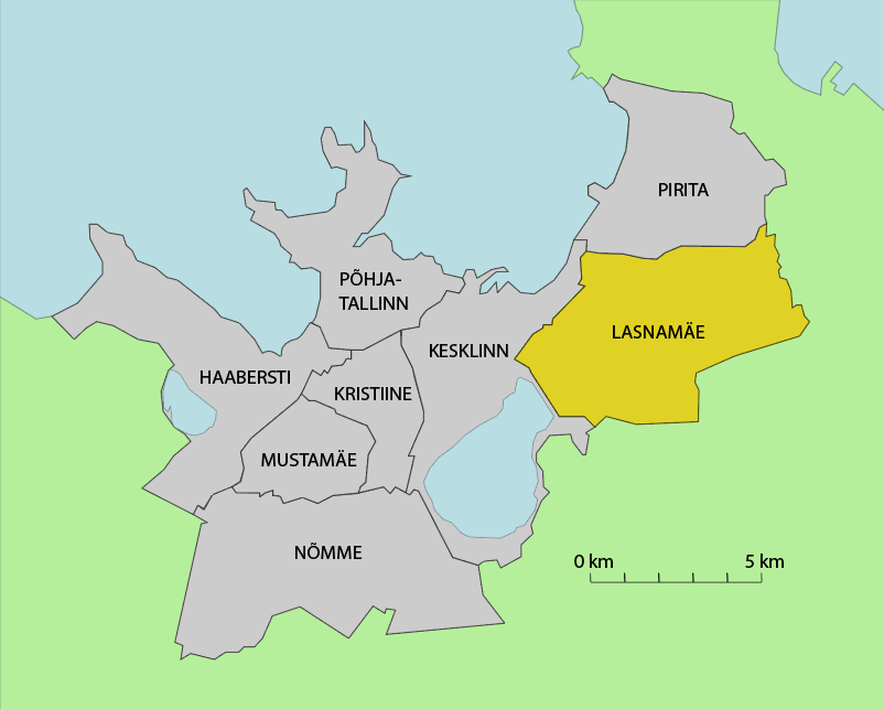 Kaart Lasnamäe linnaosa paiknemisest Tallinnas.